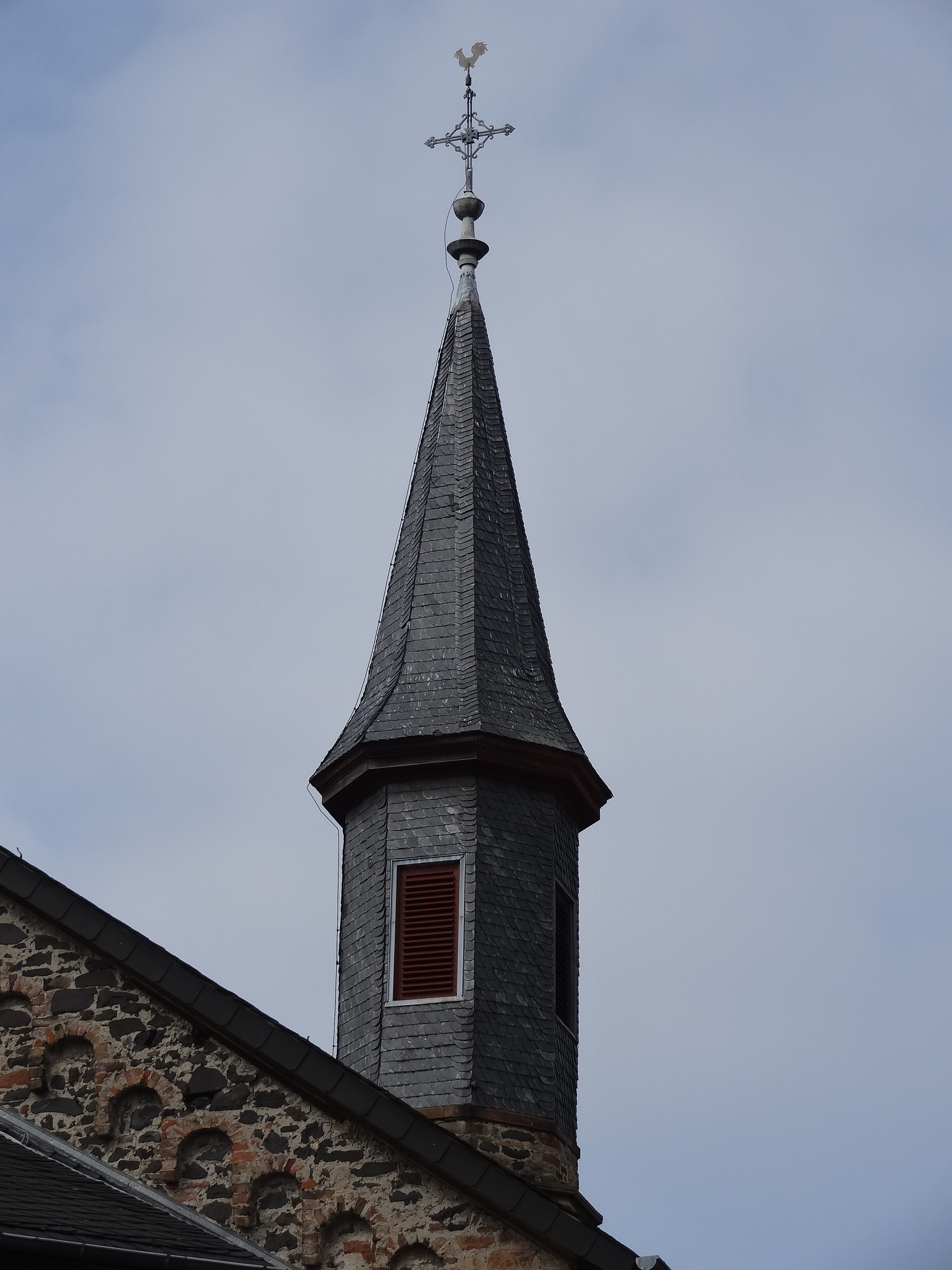 Evangelische Kirche Borsdorf